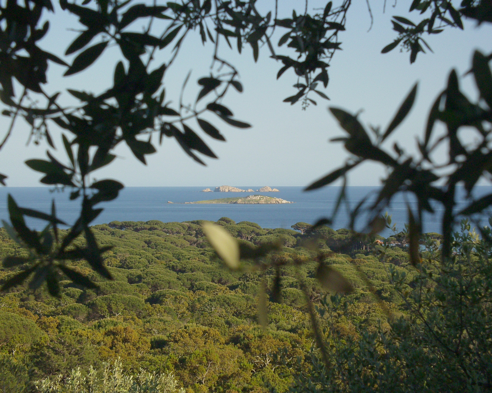 Îles Cerbicales